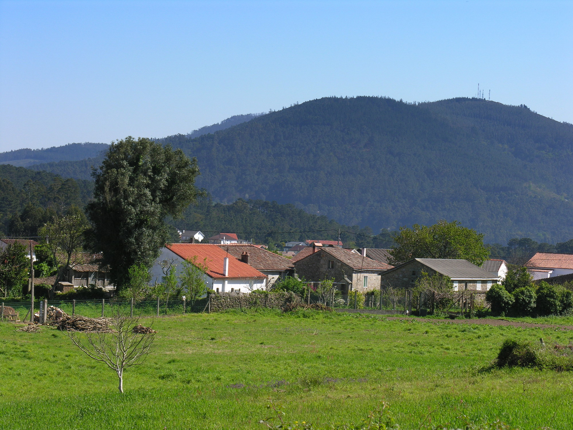 O Freixo de Sabardes, Serra de Outes, (Galiza)